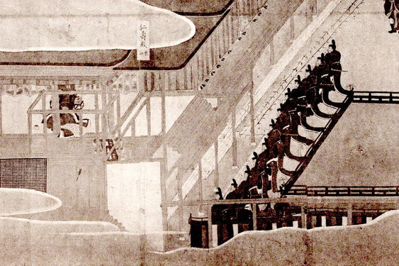 『年中行事絵巻』巻五、「内宴」での内大臣以下公卿の天皇への拝礼の図。内宴は長元7年(1034)以来行われていなかったが、保元3年(1158)とその翌年に123年ぶりに行われた。それなどによって『年中行事絵巻』の作成年代がおおよそ判明する。